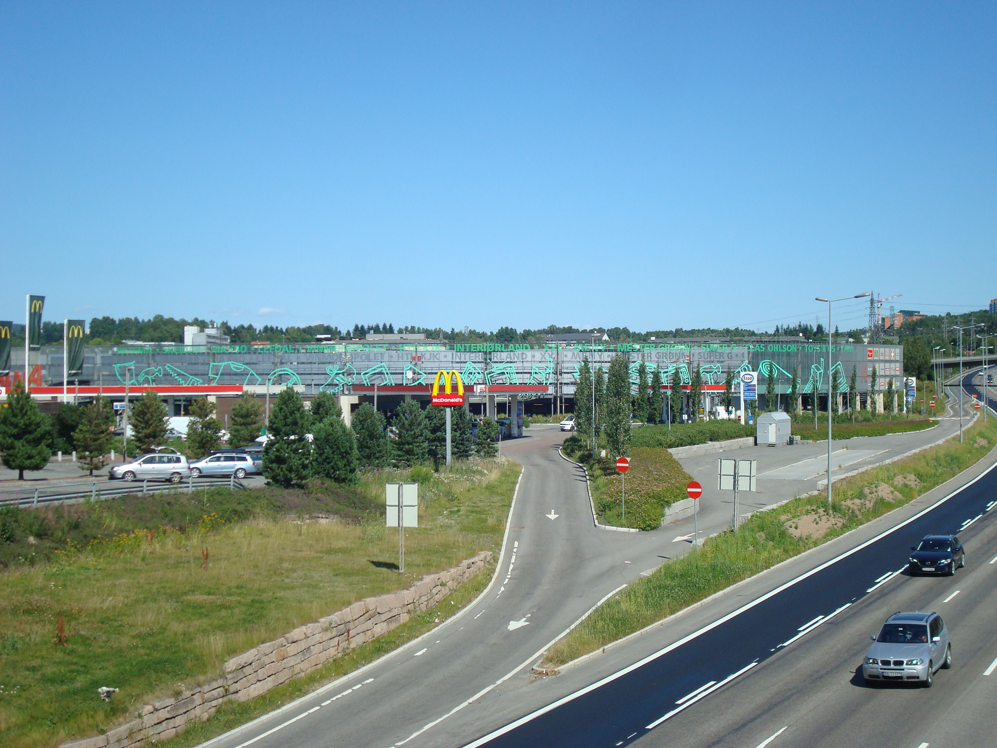 Alna Senter i Oslo. E6 i forgrunnen.